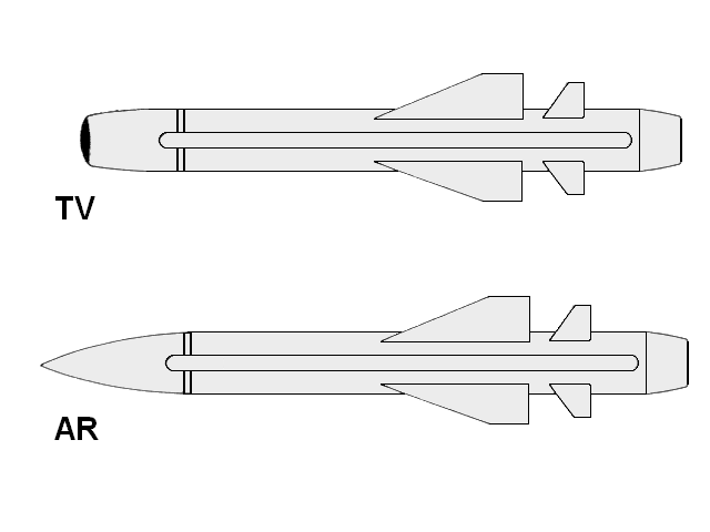 Profile of missile AJ 168 Martel (AS 37)Profil du missile AS 37 Martel (AJ 168)